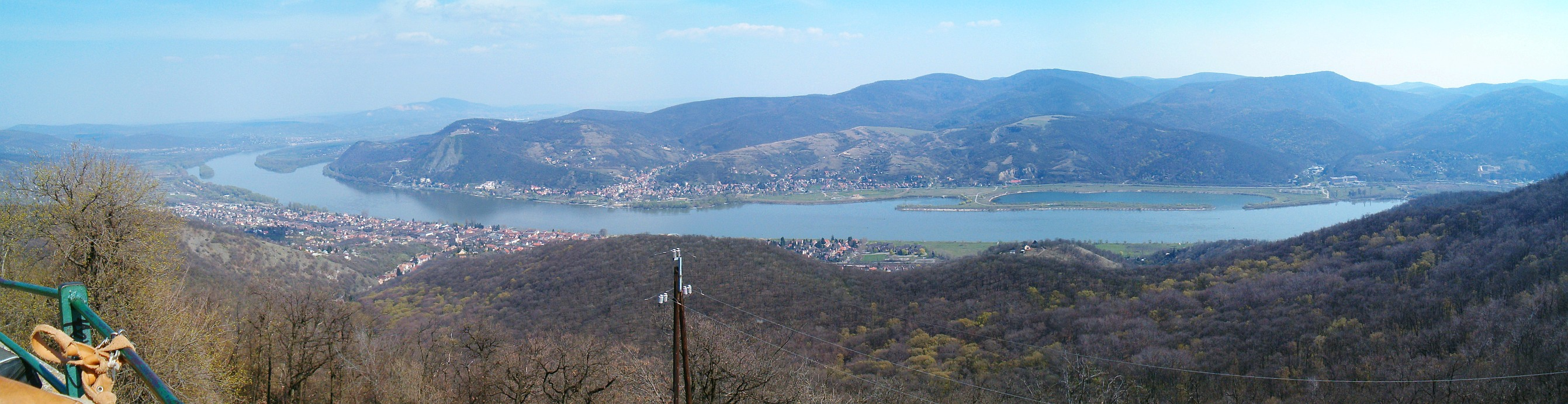 Nagymaros - Visegrád panorama